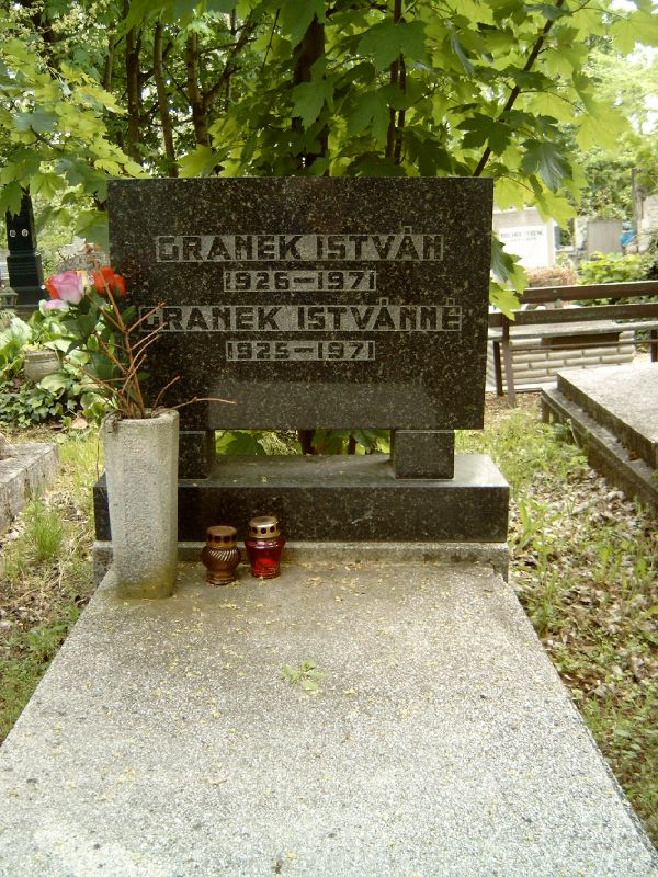 Granek István (Budapest, 1926. december 23. – Budapest, 1971. június 21.) mesteredző (kajak-kenusport) sírja Budapesten. Új köztemető: 33/4-1-79.